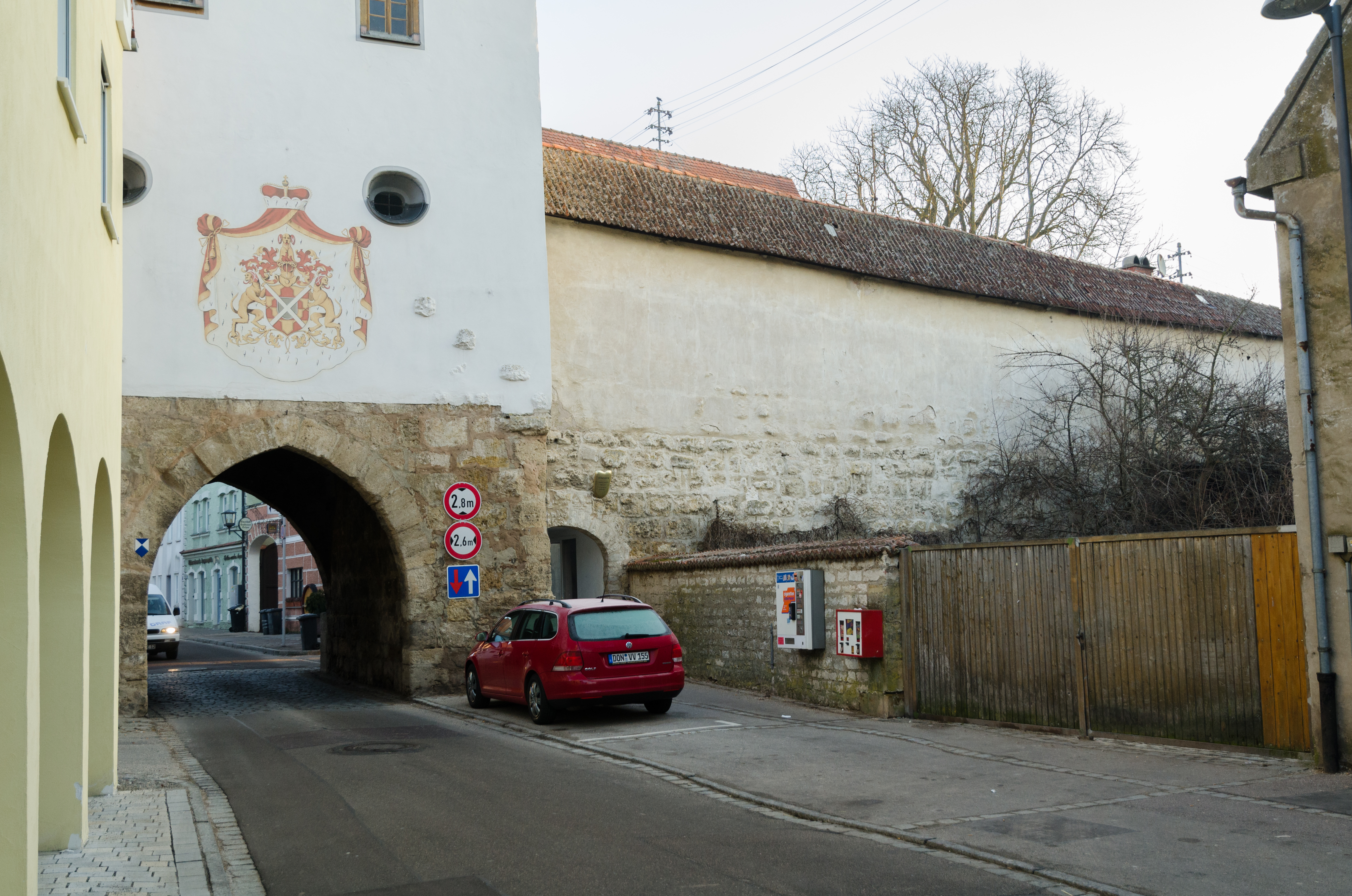 Oettingen, Königstraße 1